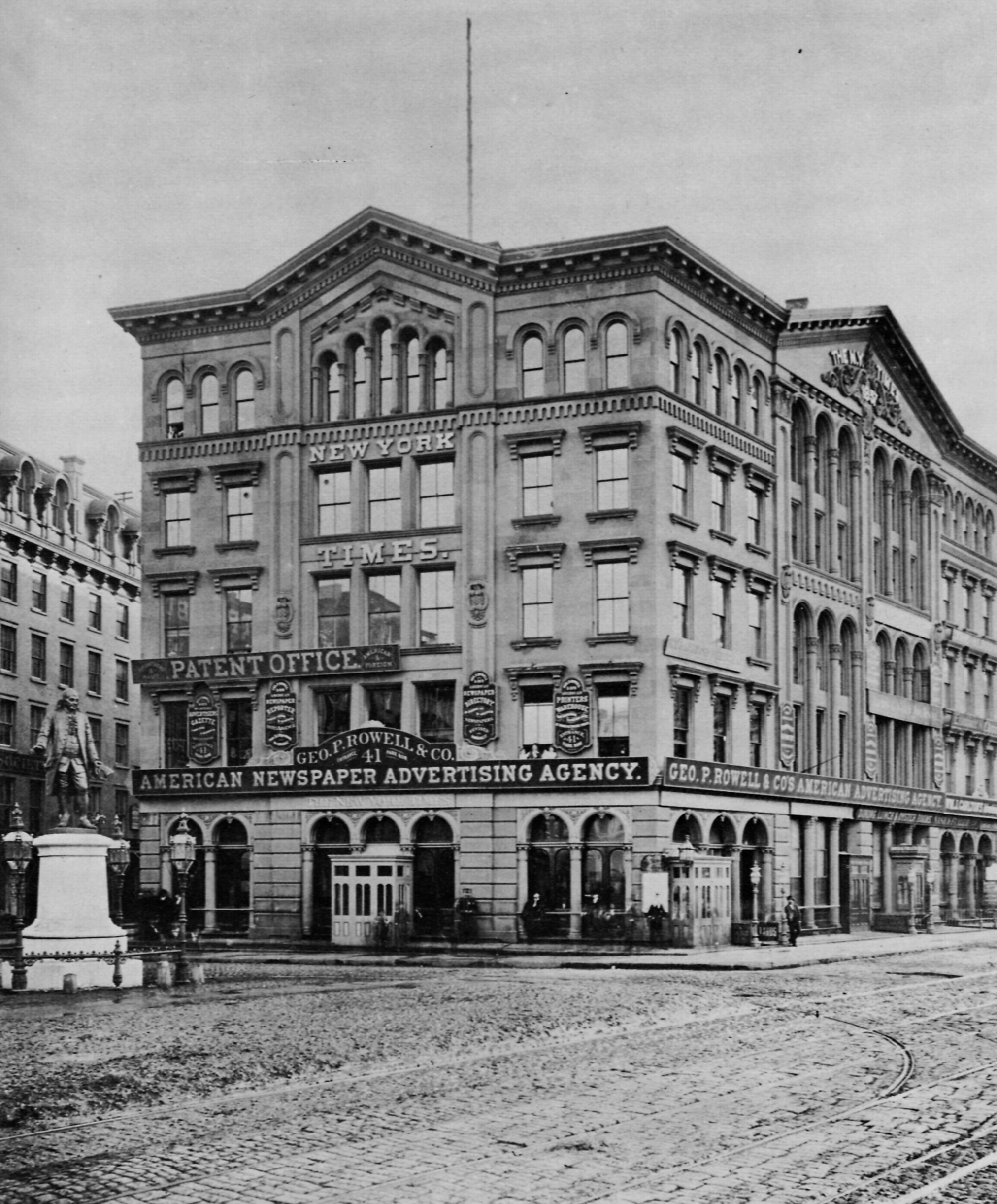 Bill, Charles K.: Das Times Gebäude